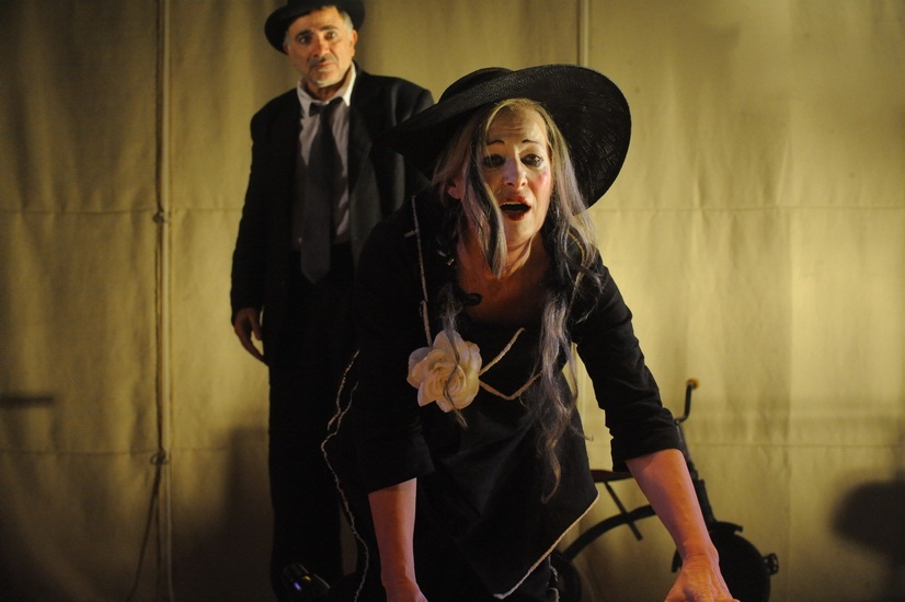 ליליאן רות חיילובסקי, בהצגה "שש דמויות מחפשות מחבר" פרי עטו של פירנדלו